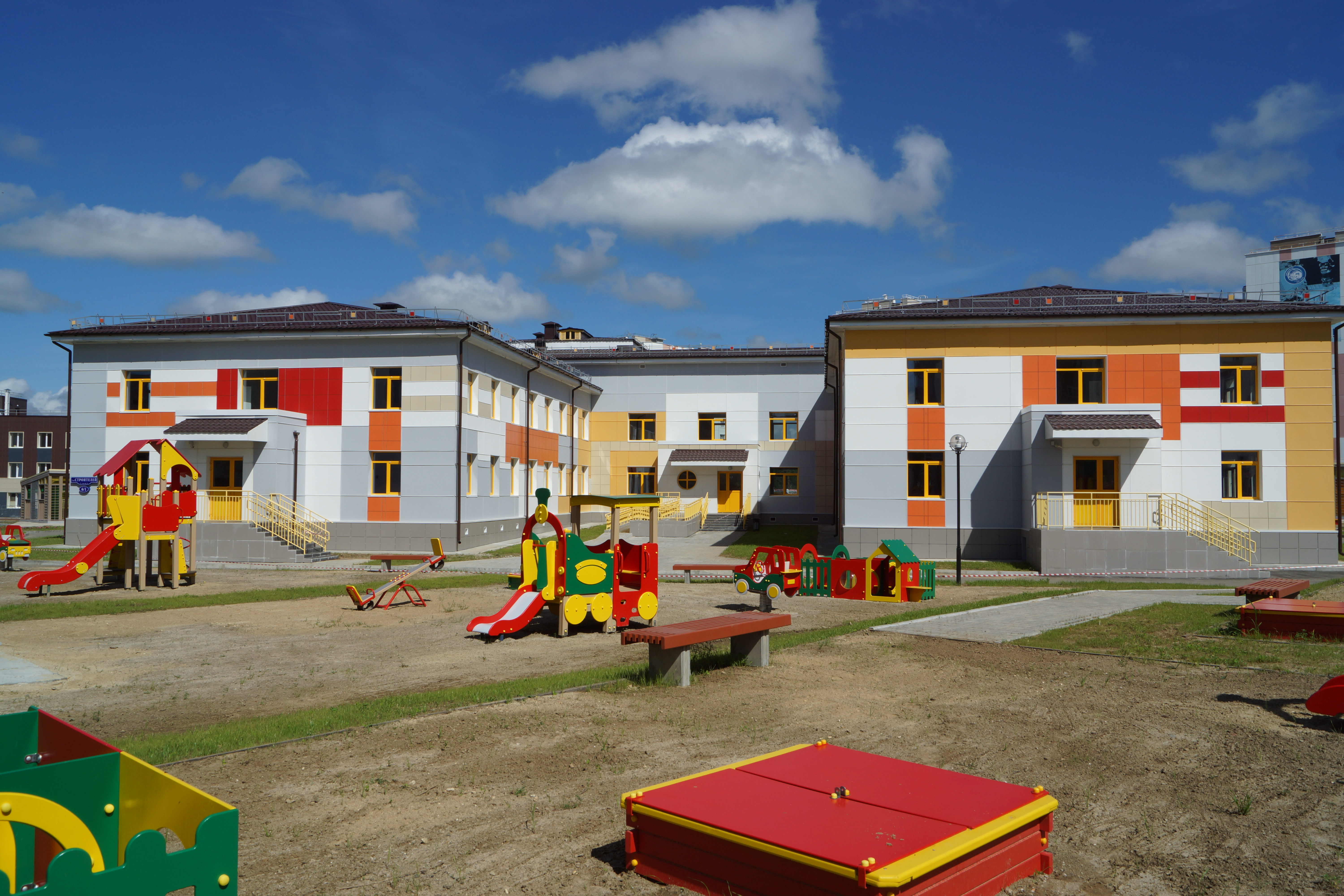 Детский сад в микрорайоне "Звездный" города Циолковский, Амурской области